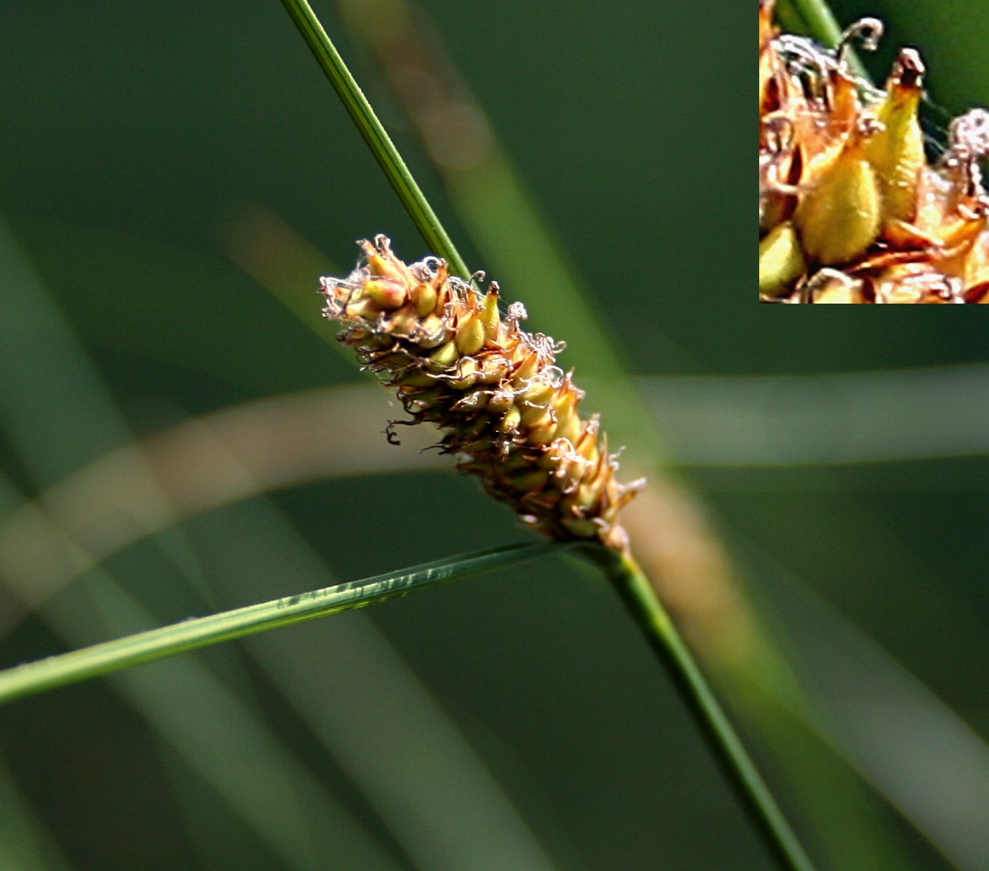 Zaborski Park Krajobrazowy, kwiatostan turzycy nitkowatej